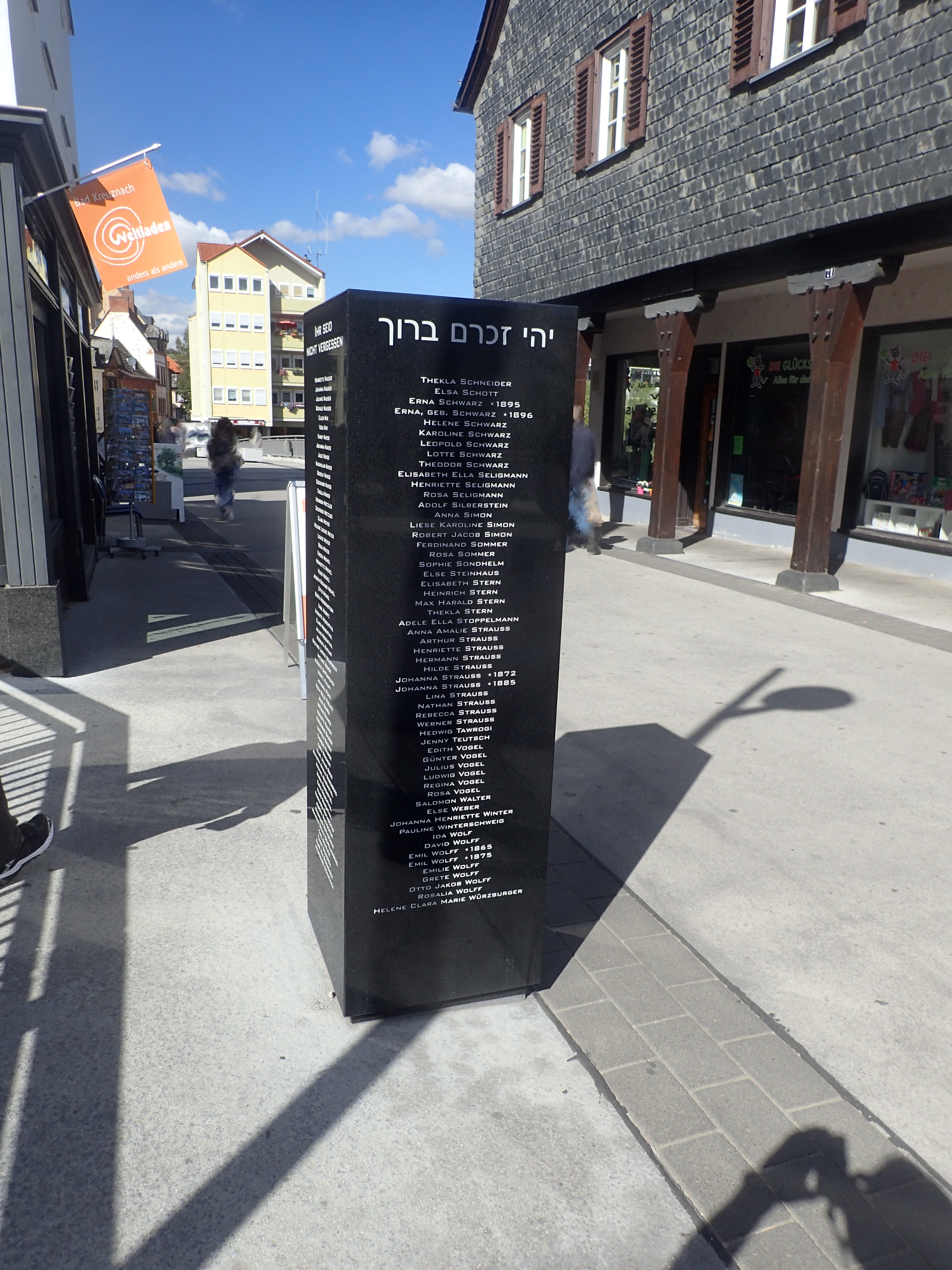 Gedenkstele für die von den Nationalsozialisten ermordeten jüdischen Mitbürger der Stadt Bad Kreuznach Seite 4